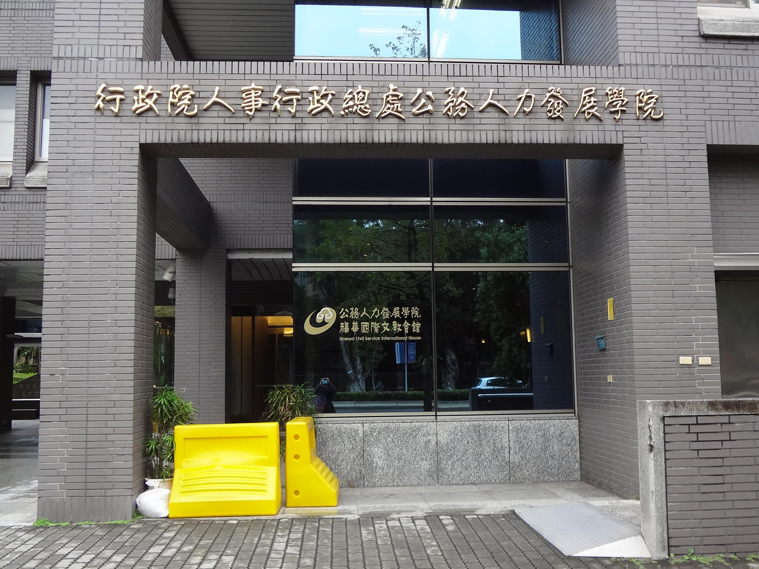 公務人力發展學院福華國際文教會館，係行政院人事行政總處公務人力發展學院委託福華大飯店經營。